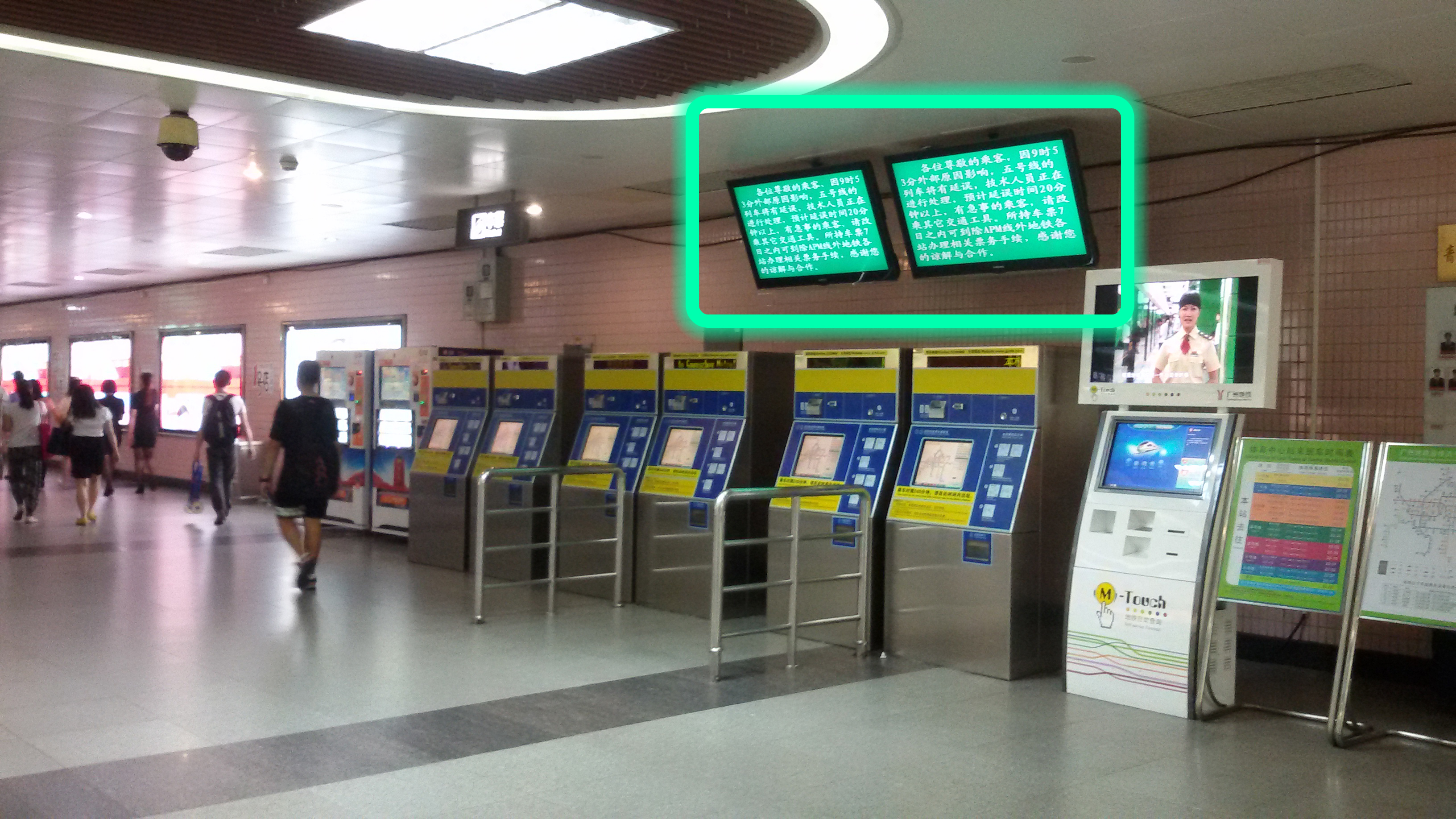 粵語: 廣州地鐵5號綫喺2014年8月28號嘅延誤。